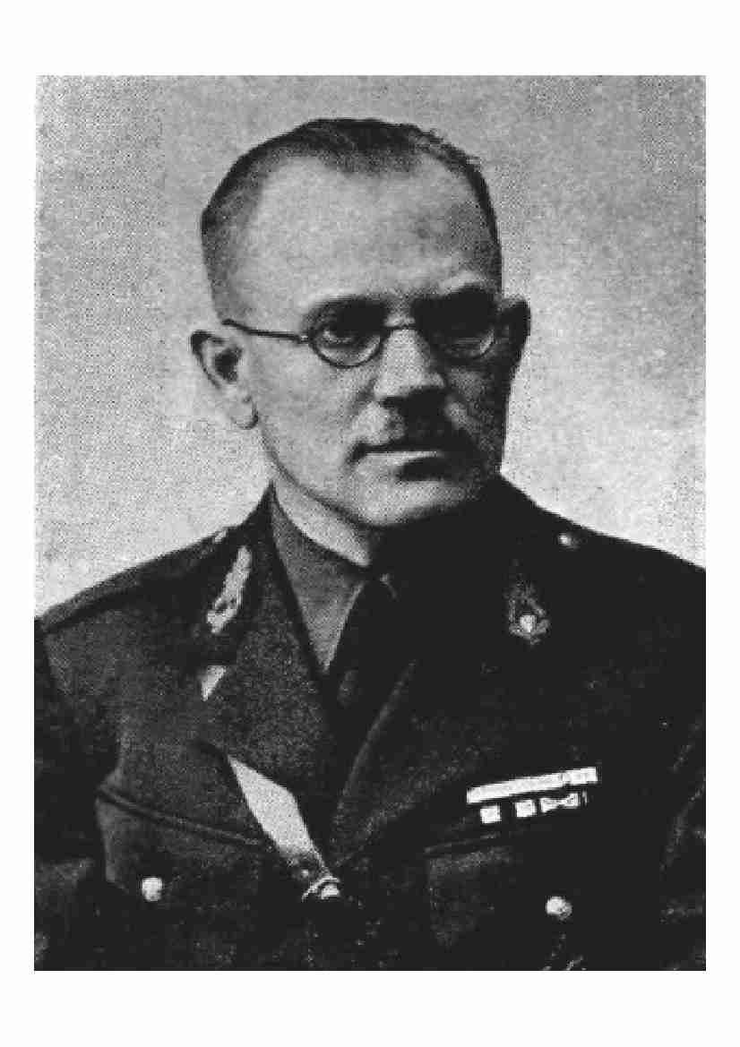 Anders Lindkvist. Algupärane pilt on pärit Nõukogude Liidu poolt likvideeritud Kaitseliidu arhiivist.